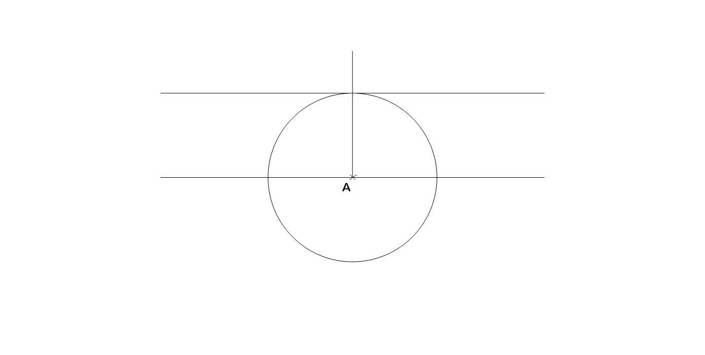 etape4